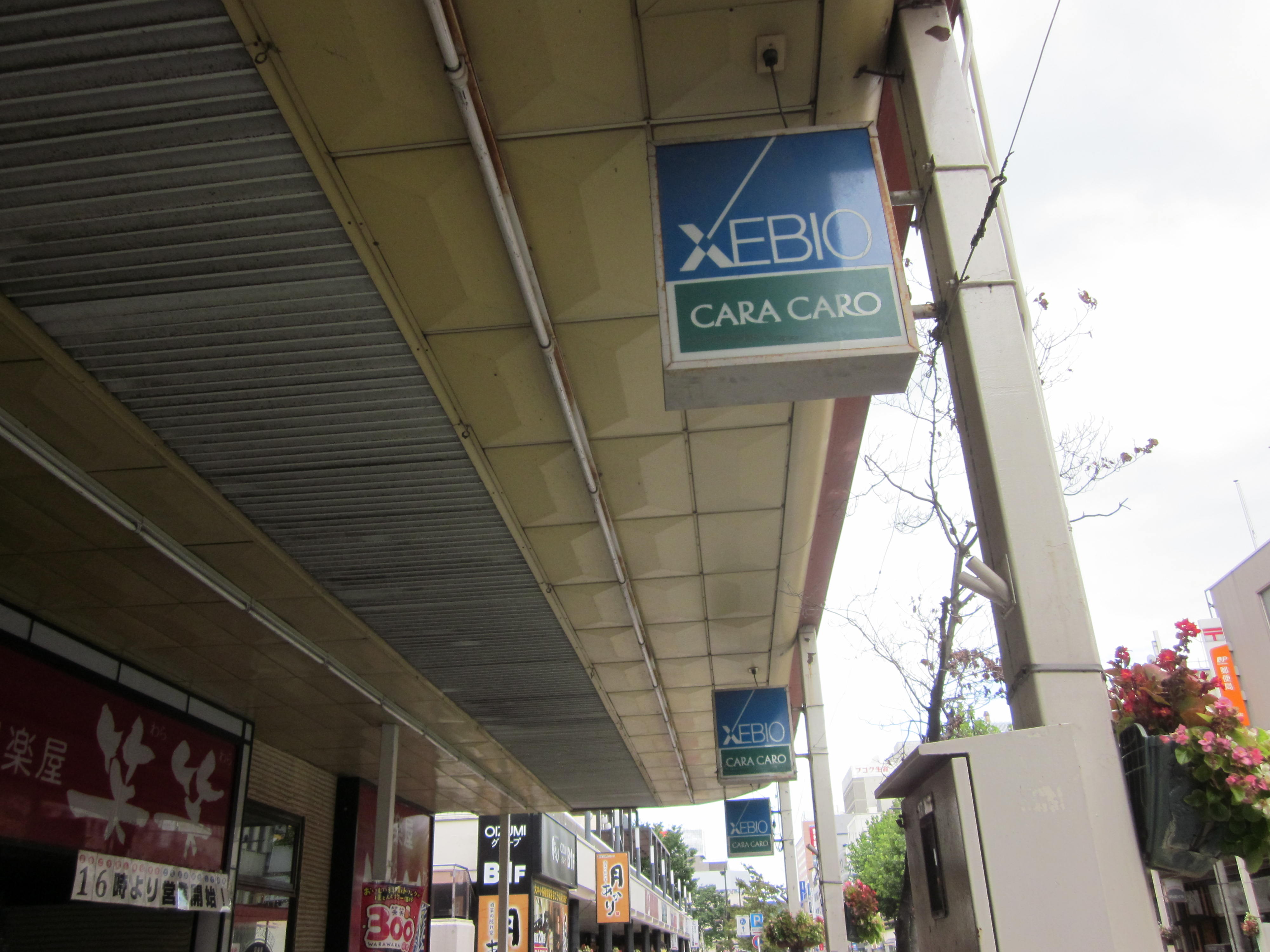 2012年9月1日撮影、福島駅前のアーケードより。